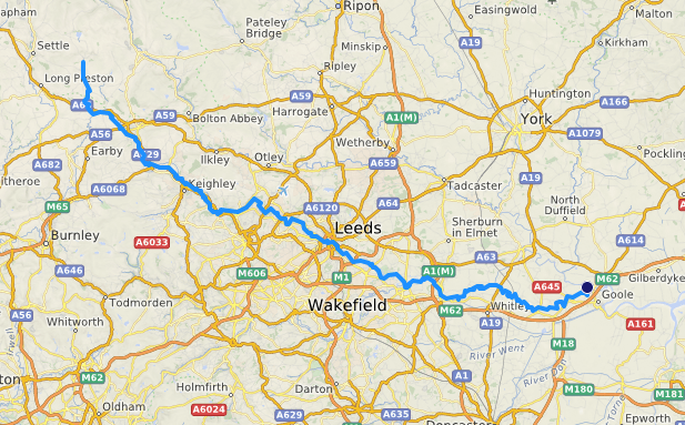 carte réalisée sur umap This map may be incomplete, and may contain errors. Don't rely solely on it for navigation.